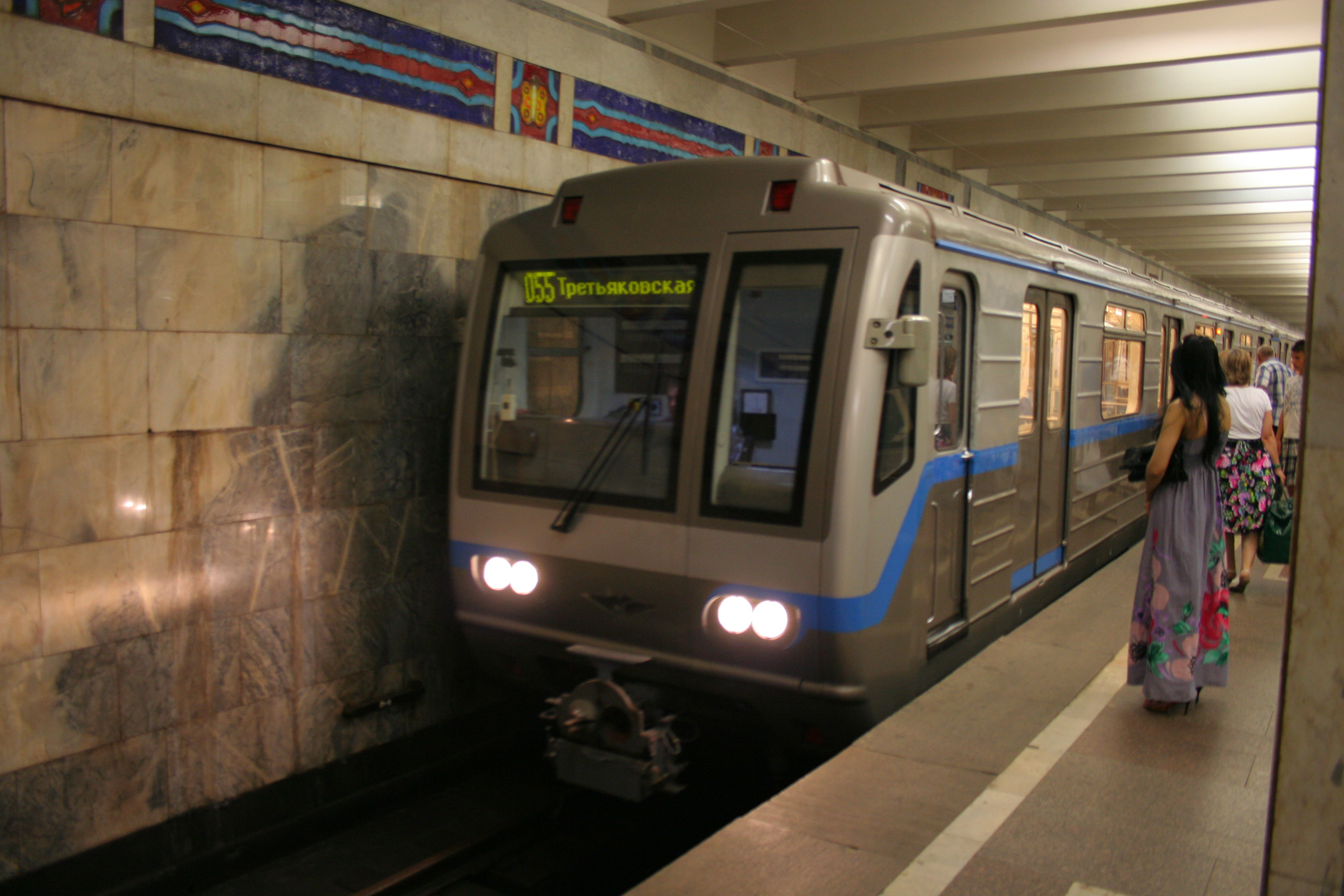 Ein Zug der Baureihe 81-717.6/714.6 in der Metro Moskau.